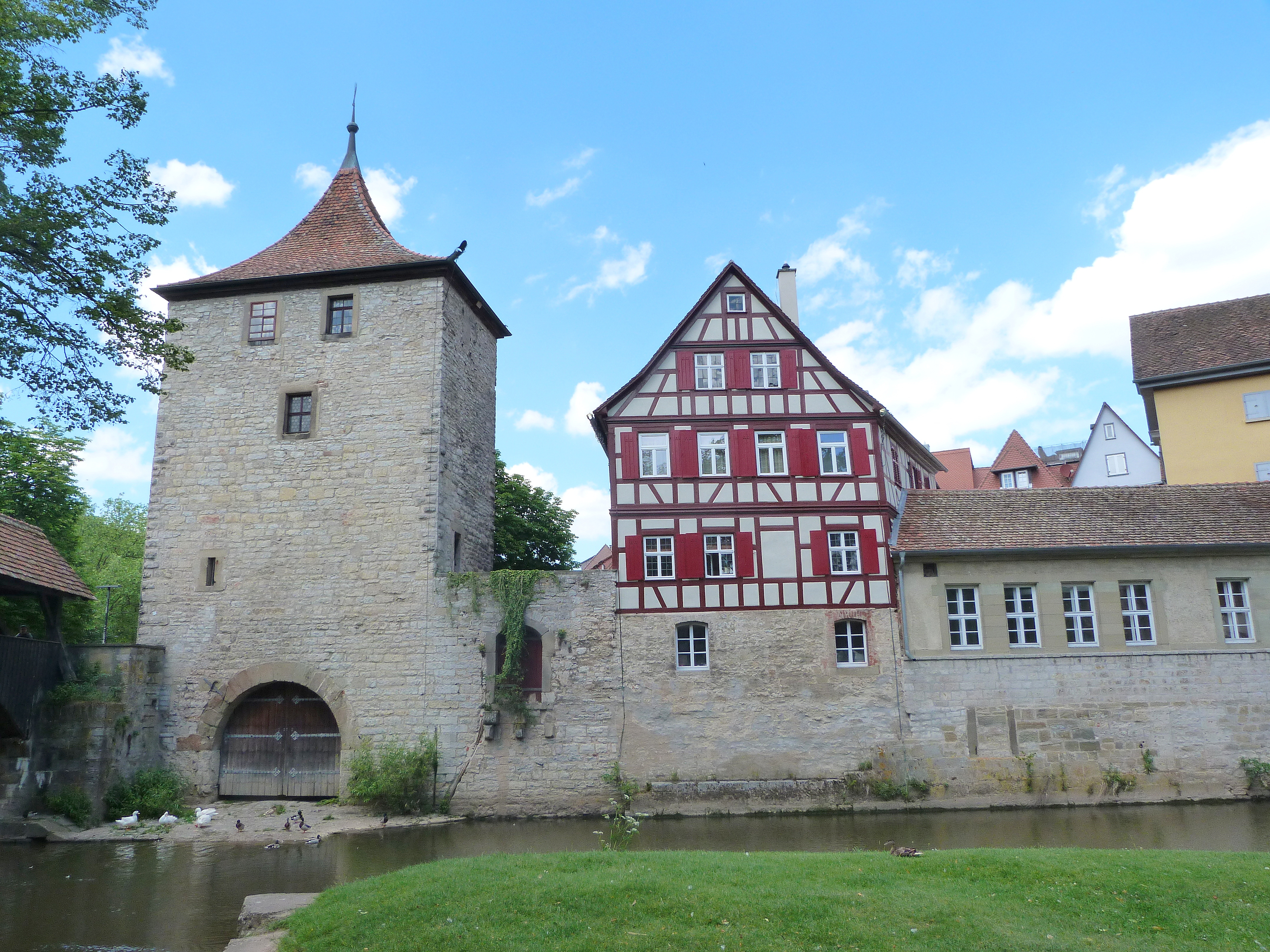 Sulferturm